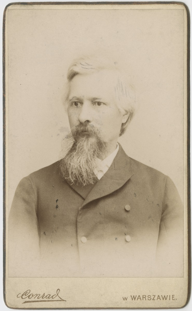 Ludomir Dymitrowicz